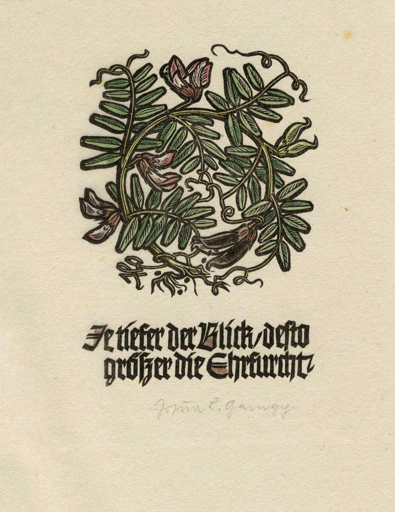 Holzschnitt-Druck